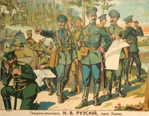 Почтовая открытка. Генерал-адъютант Н.В.Ру́зский. Герой Львова. Никола́й Влади́мирович Ру́зский (1854—1918) — генерал-адъютант, генерал от инфантерии, член Военного и Государственногосоветов. Участник русско-турецкой 1877—1878 гг., русско-японской 1904—1905 гг. и Первой мировой войн.